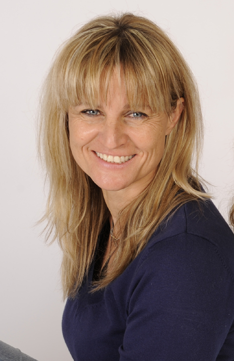 Autorin und Journalistin